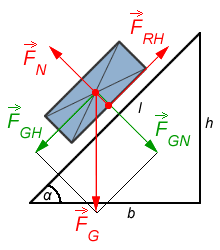 Zeichnung der schiefen Ebene mit Vektoren